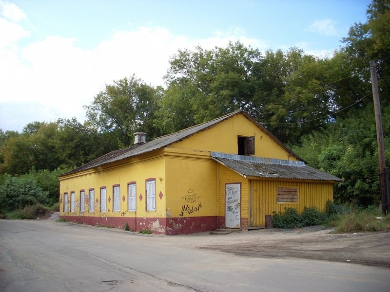 Магілёў. Школішча. Захаваны цокаль гістарычнага дома